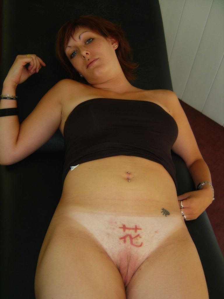 hanabira scarification